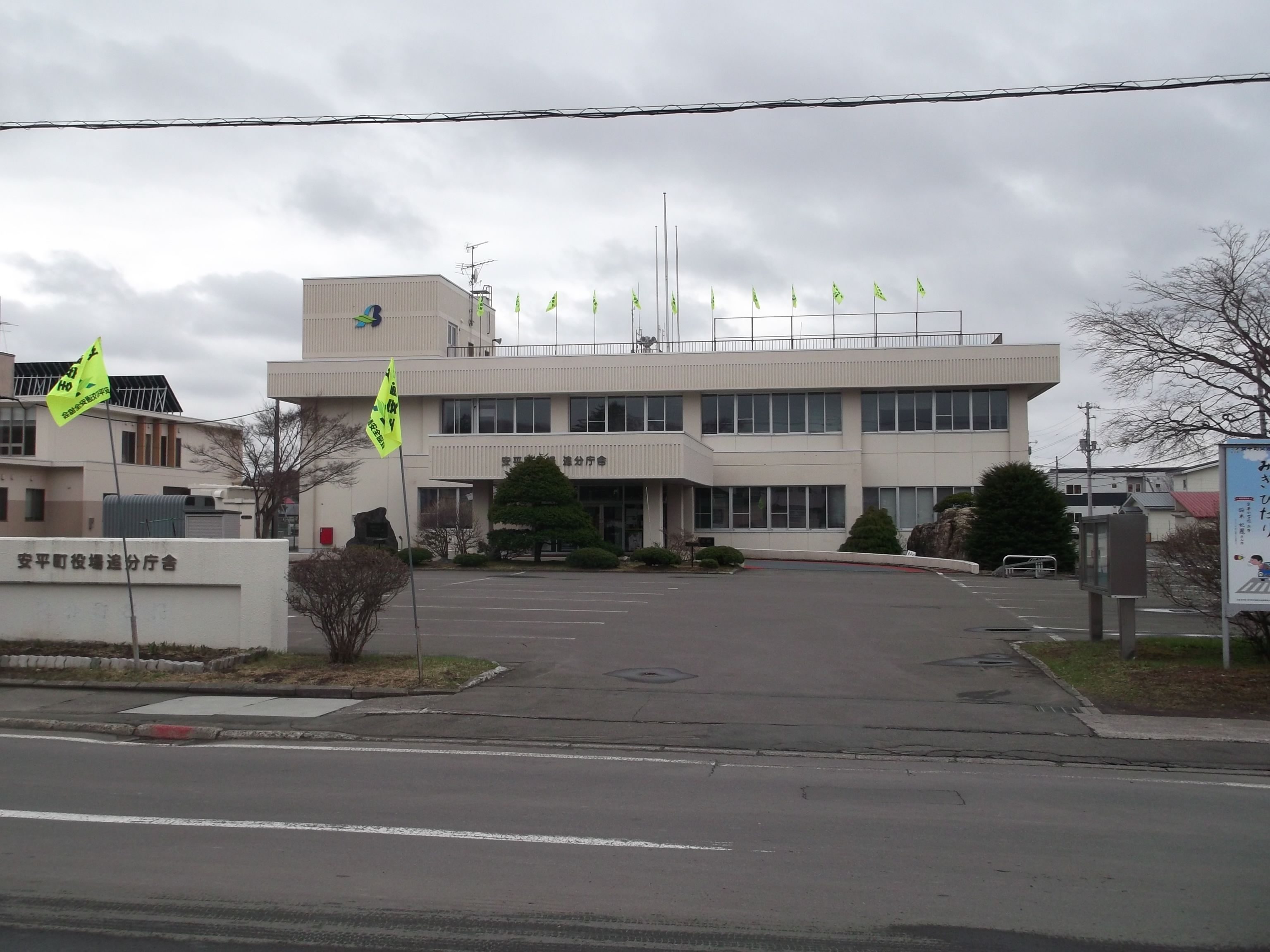 北海道安平町追分庁舎（旧追分町役場）